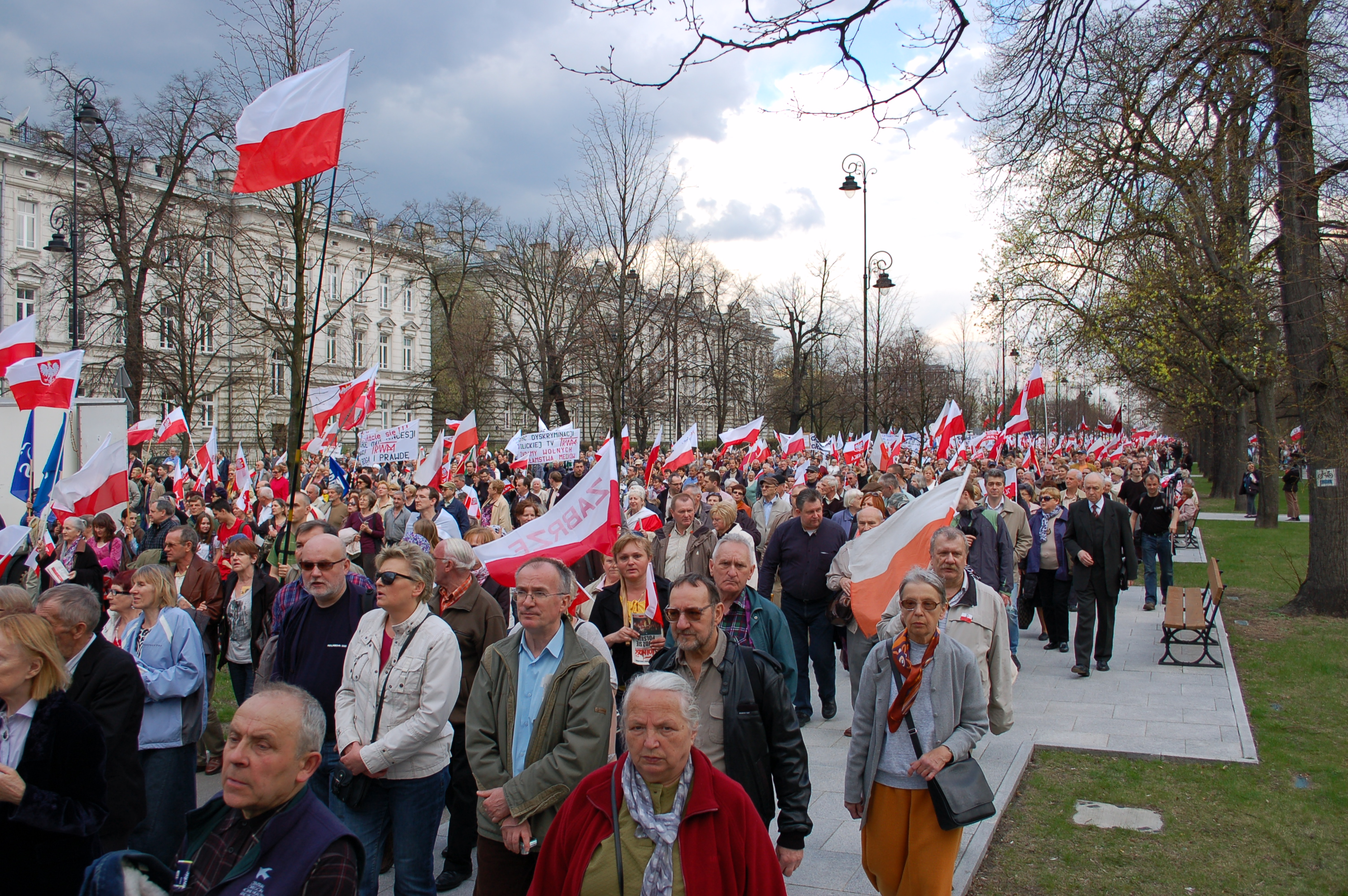 Kundgebung 21. April 2012 Warschau (TV Trwam u.a.)